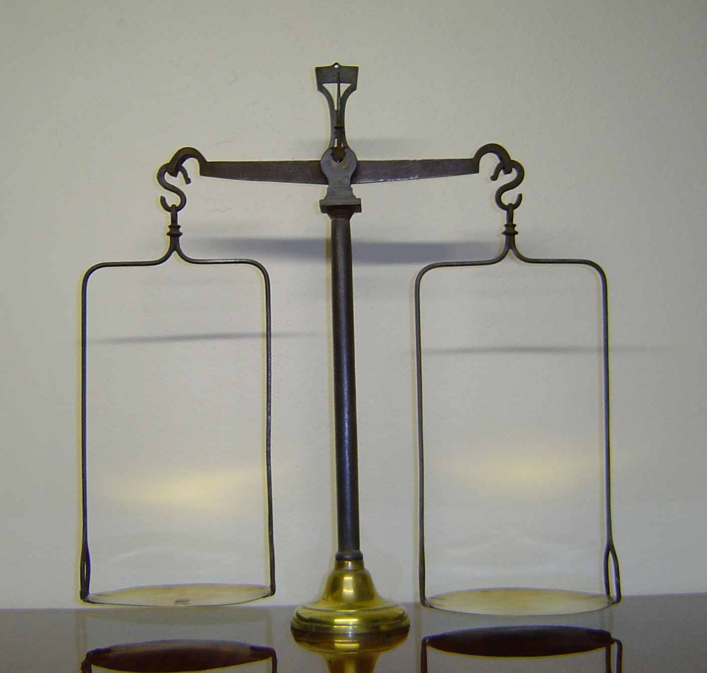 Photo personnelle de ma collection